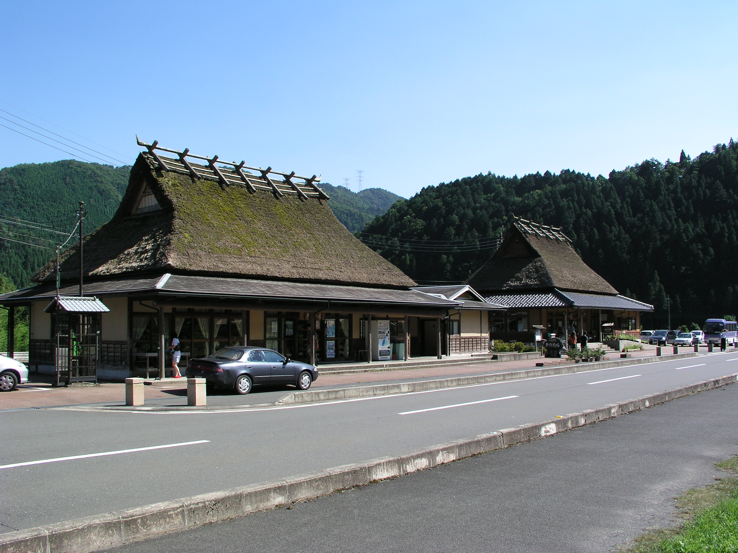 Yao Kayabukinosato in Nantan, Kyoto, Japan